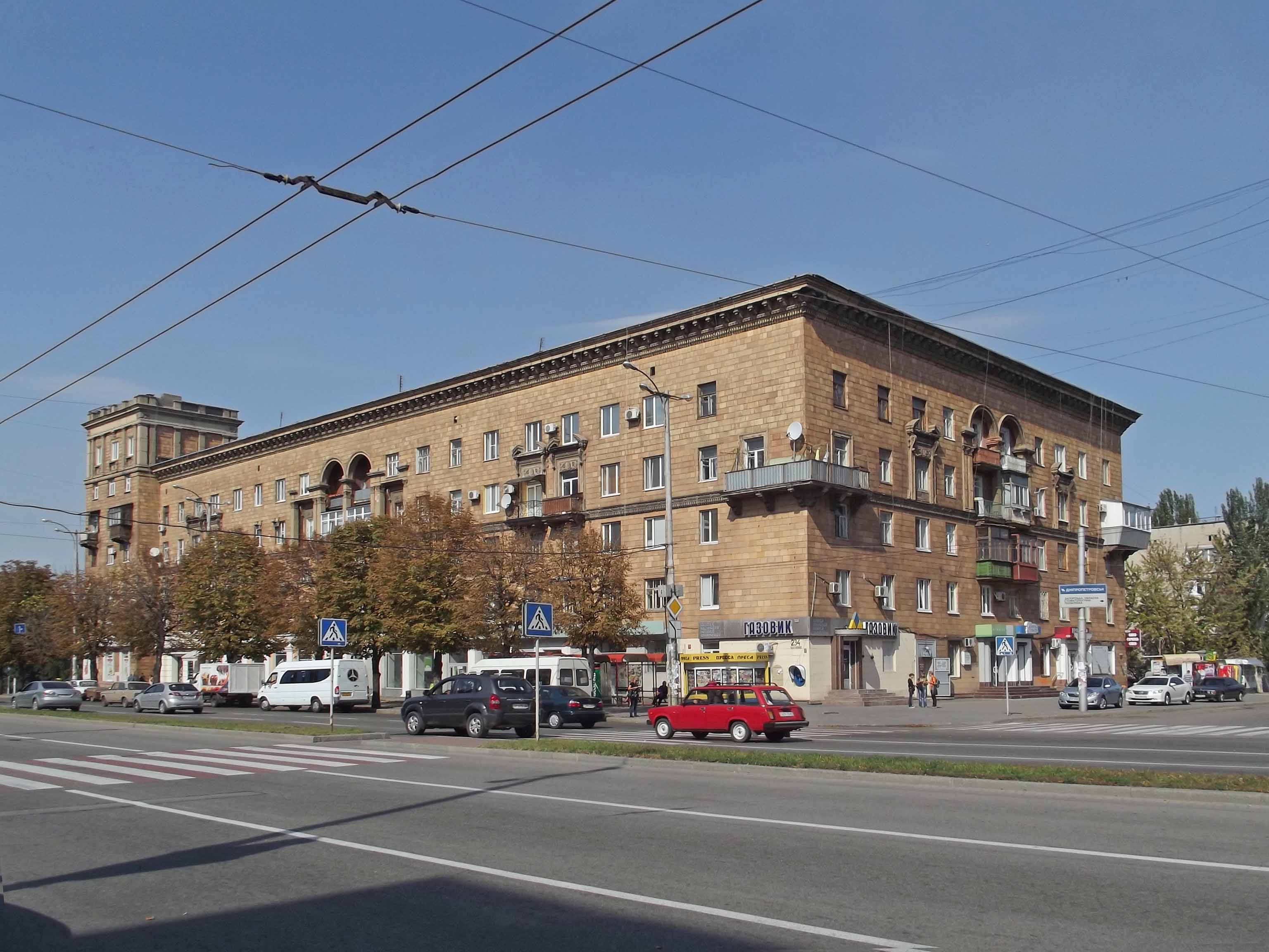 Окончание проспекта Ленина